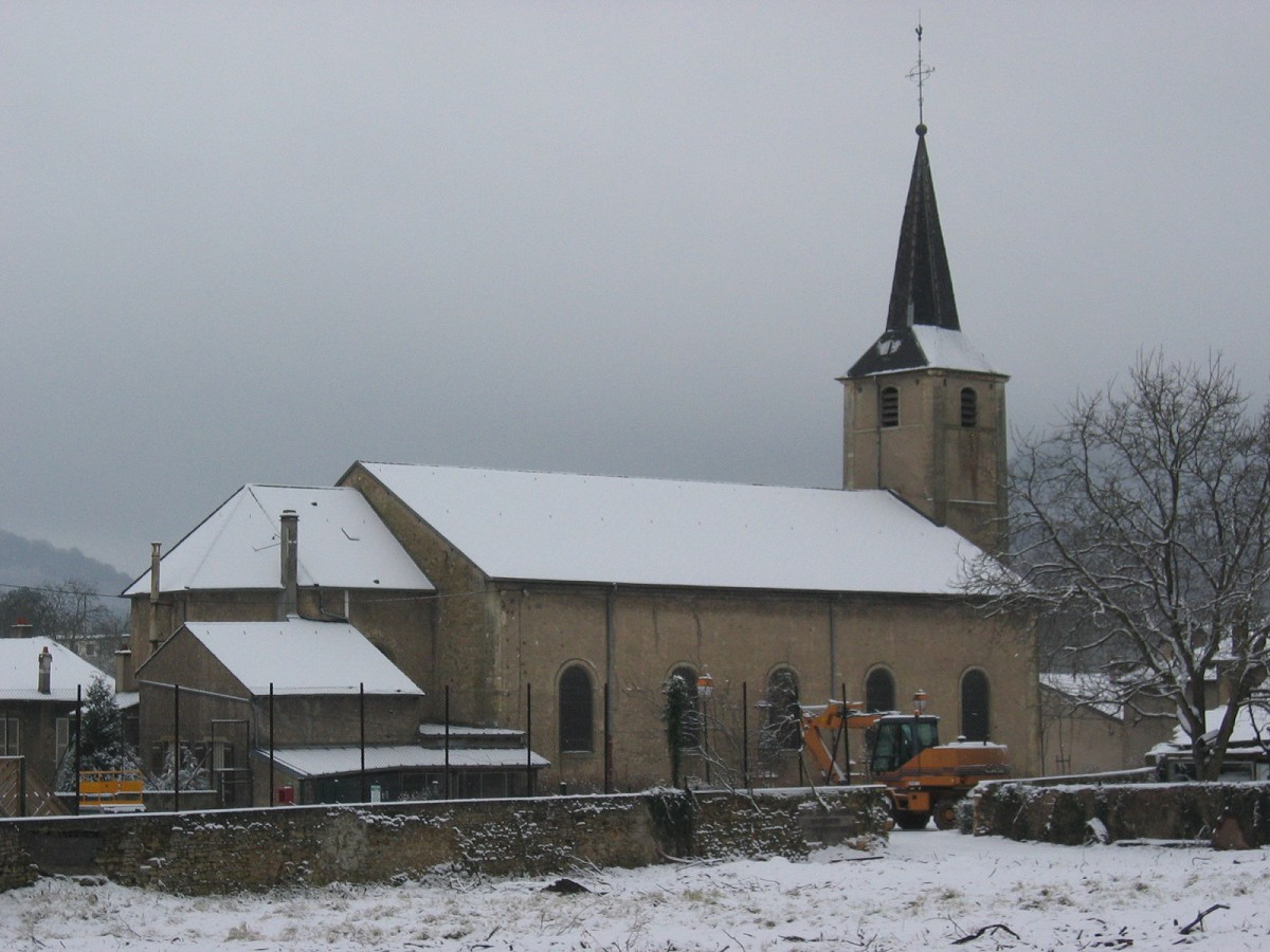 Oeutrange church - Eglise d'Oeutrange